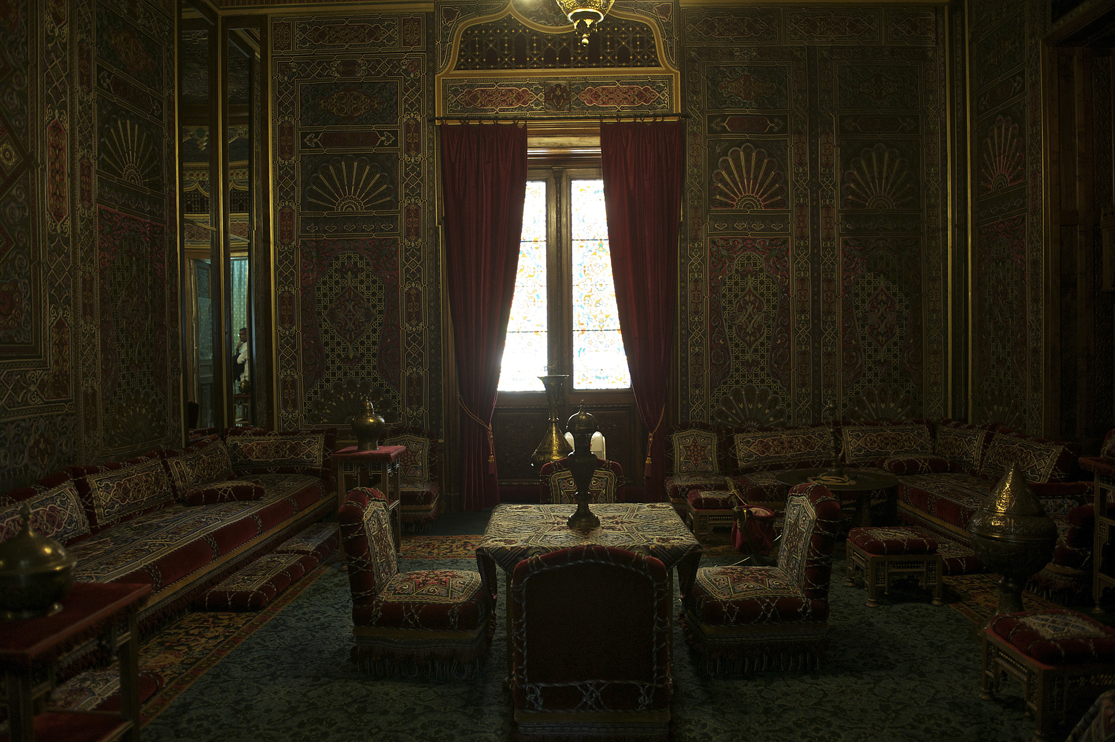 Castelul Peleș 01